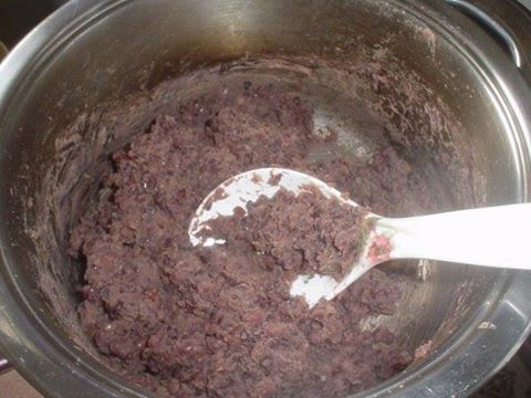 မြန်မာဘာသာ: ပဲစာဥအရောအနှော